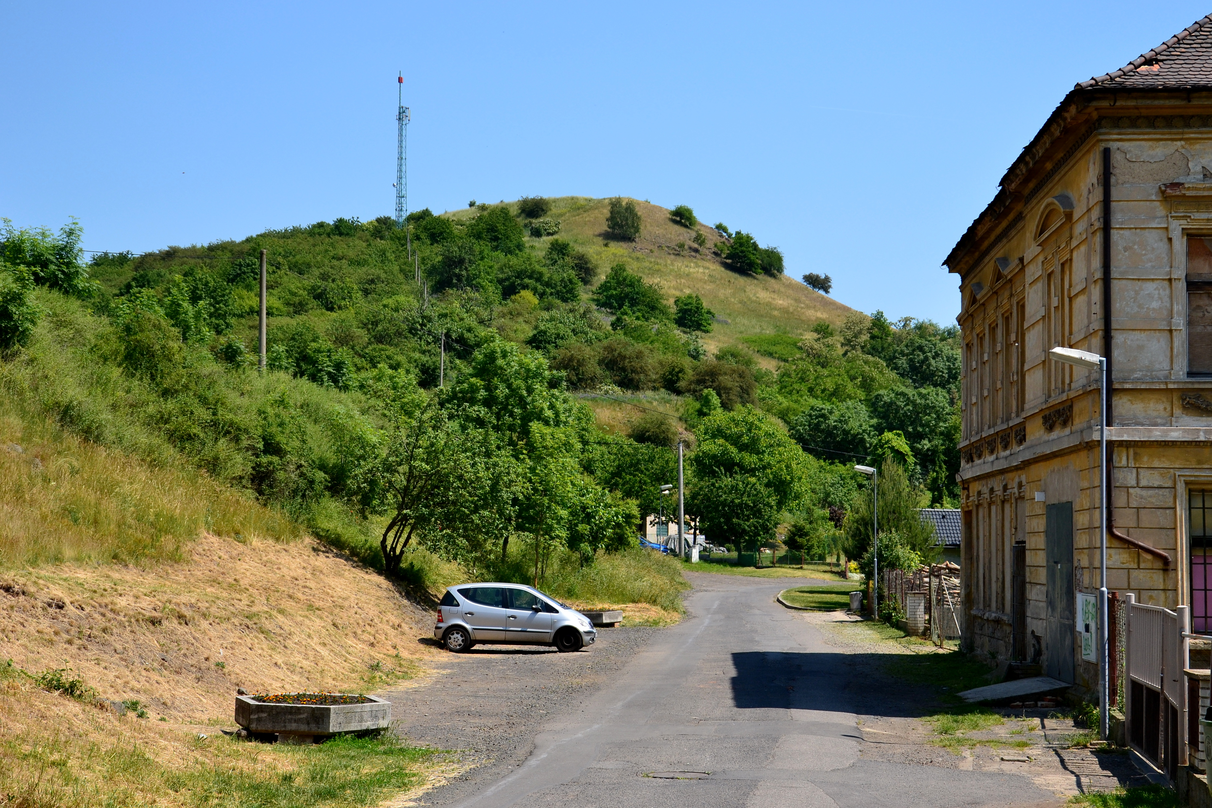 Celkový pohled na vrch